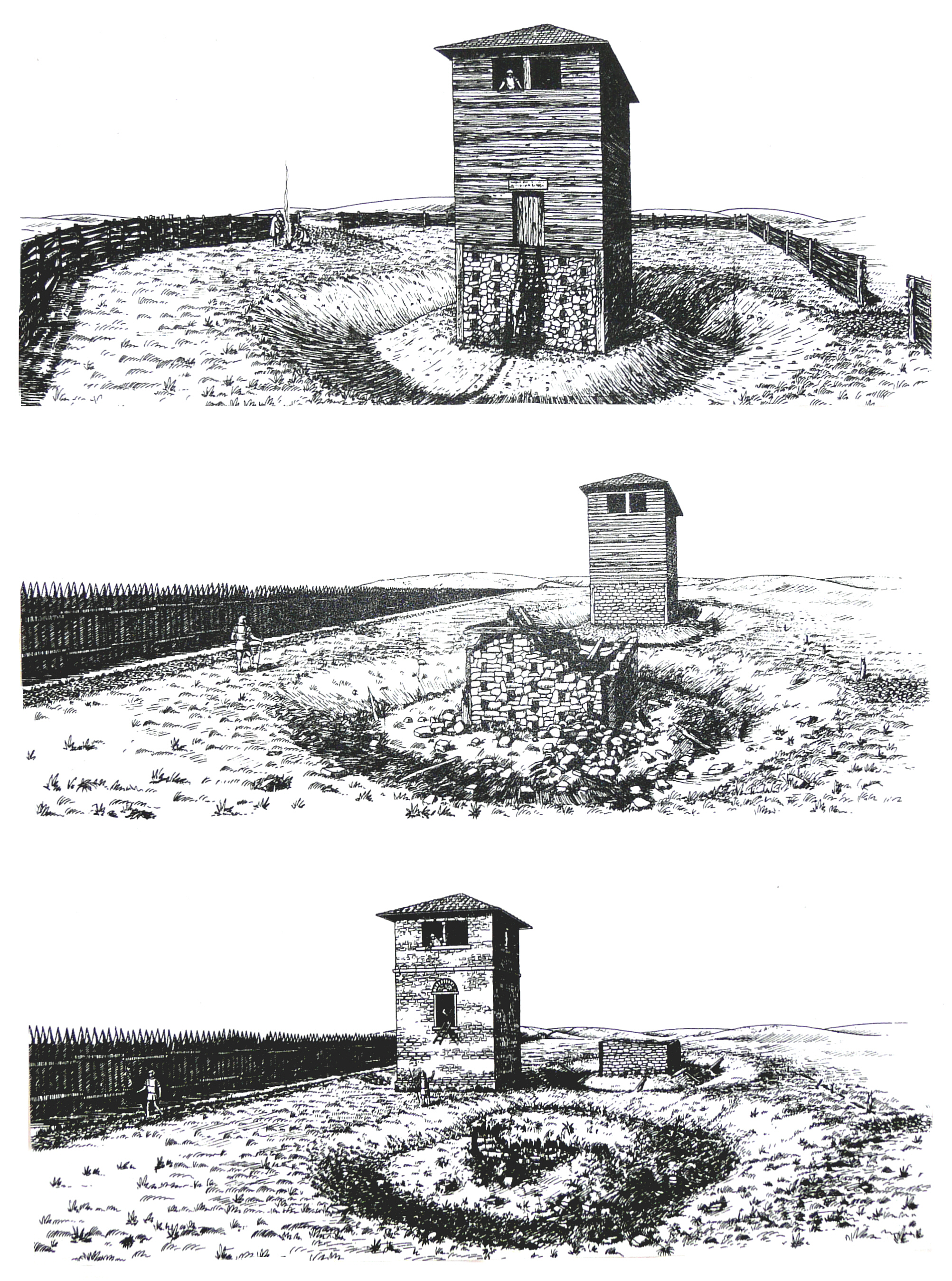 Entwicklungsstufen des Odenwaldlimes. Laut Egon Schallmayer (1984) bezieht sich die Zeichnung auf Wp 10/8 „Lützelbacher Bannholz“.